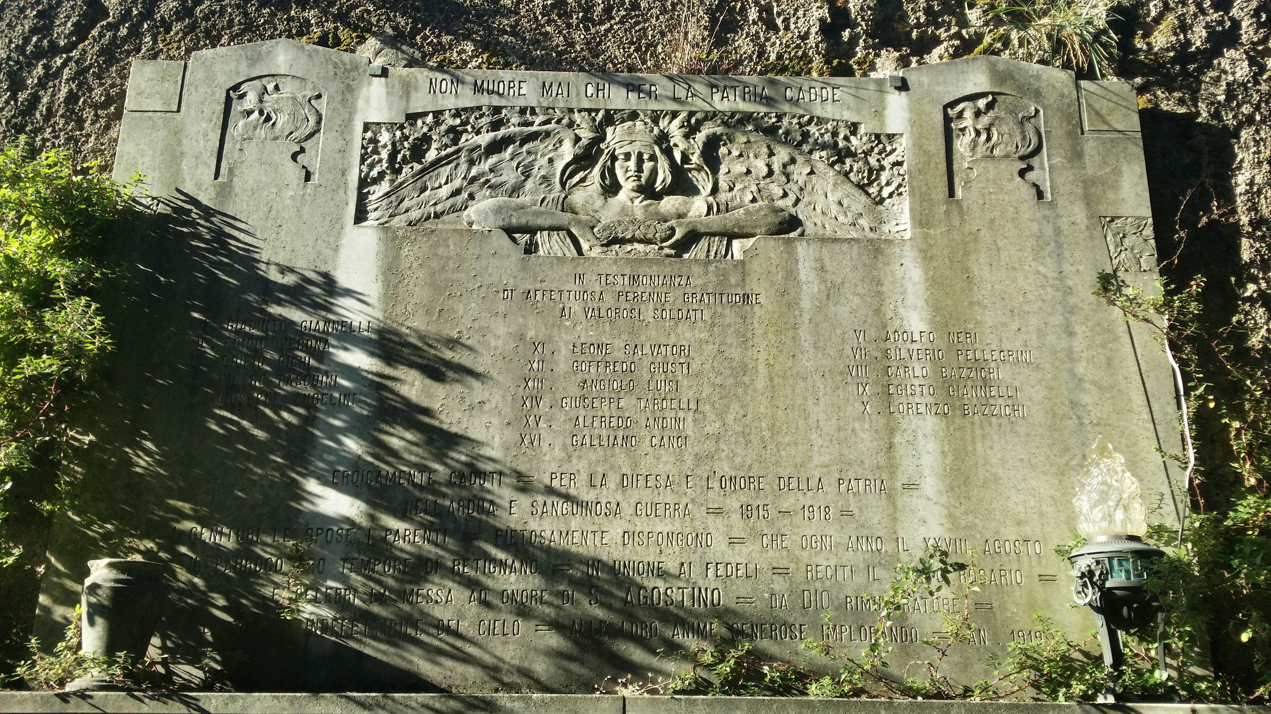 La lapide che riporta i nomi dei caduti nella Prima guerra mondiale, Parco della Rimembranza, Retignano.